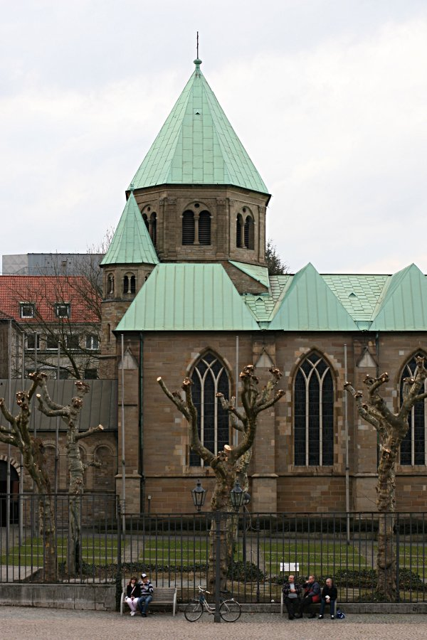 Das Westwerk der Essener Domkirche mit Ansatz des Langhauses, deutlich erkennbar die Dachgestaltung von 1880